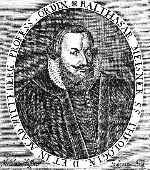 Balthasar Meisner (1587-1626), deutscher evangelisch-lutherischer Theologe und Ethiker. Kupferstich